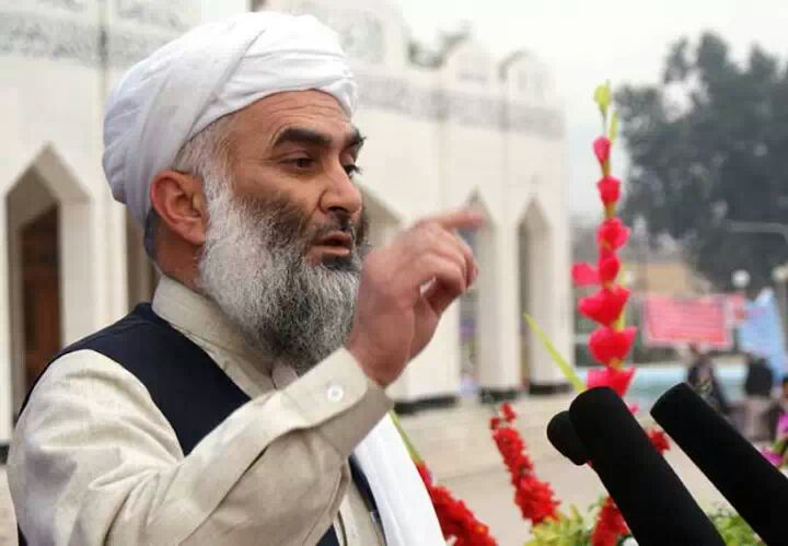 پښتو: مولانا عبدالصبور جلال اباد، افغانستان کې قرآن پوهنې دورې ته د وينا پر مهال